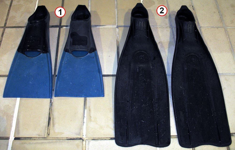 Bi-palmes